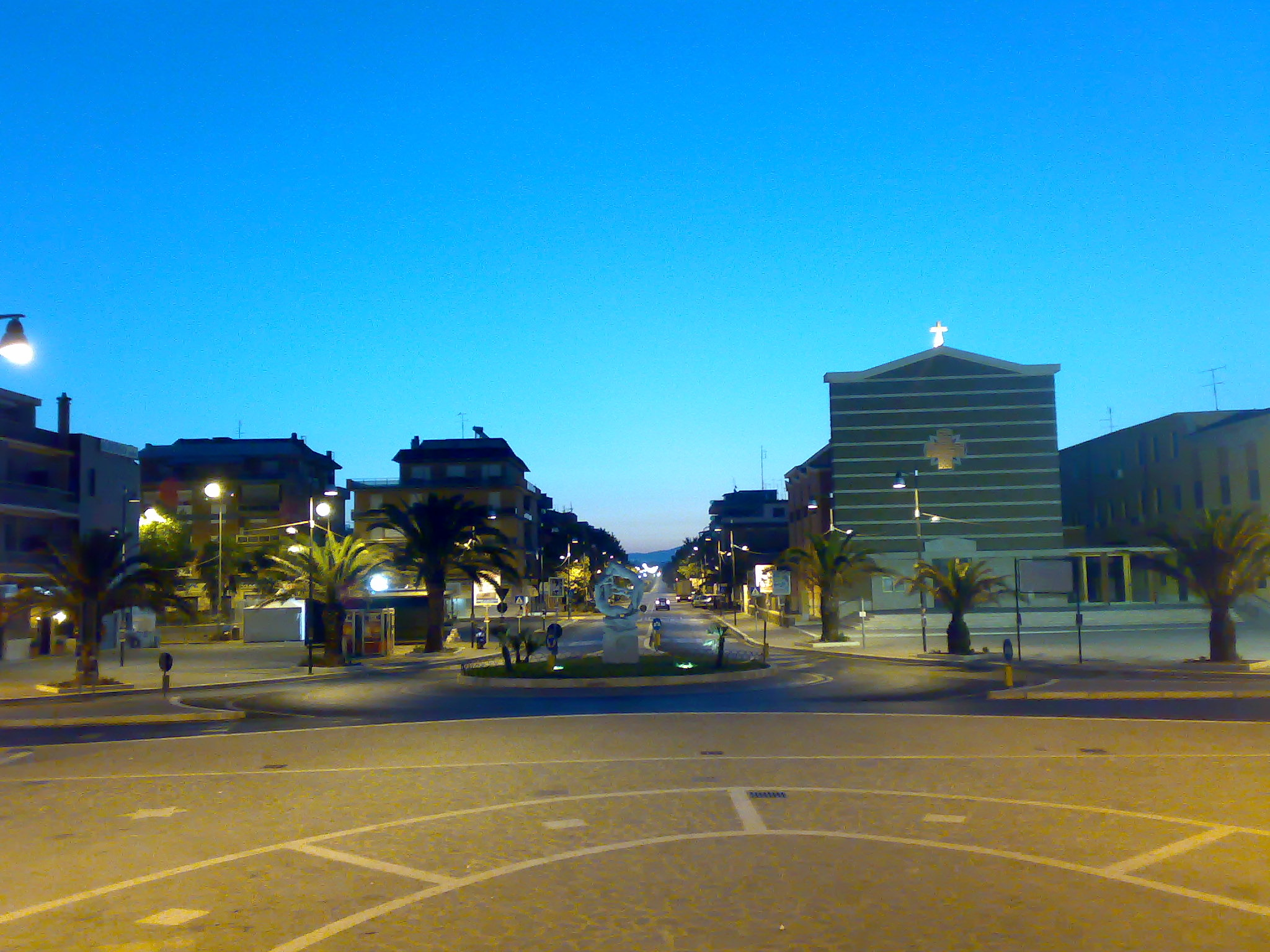 Foto scattata da me